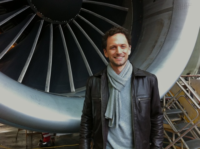 Foto Moderator Markus Mooslechner